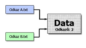 Ilustrace fungováni pevného linku